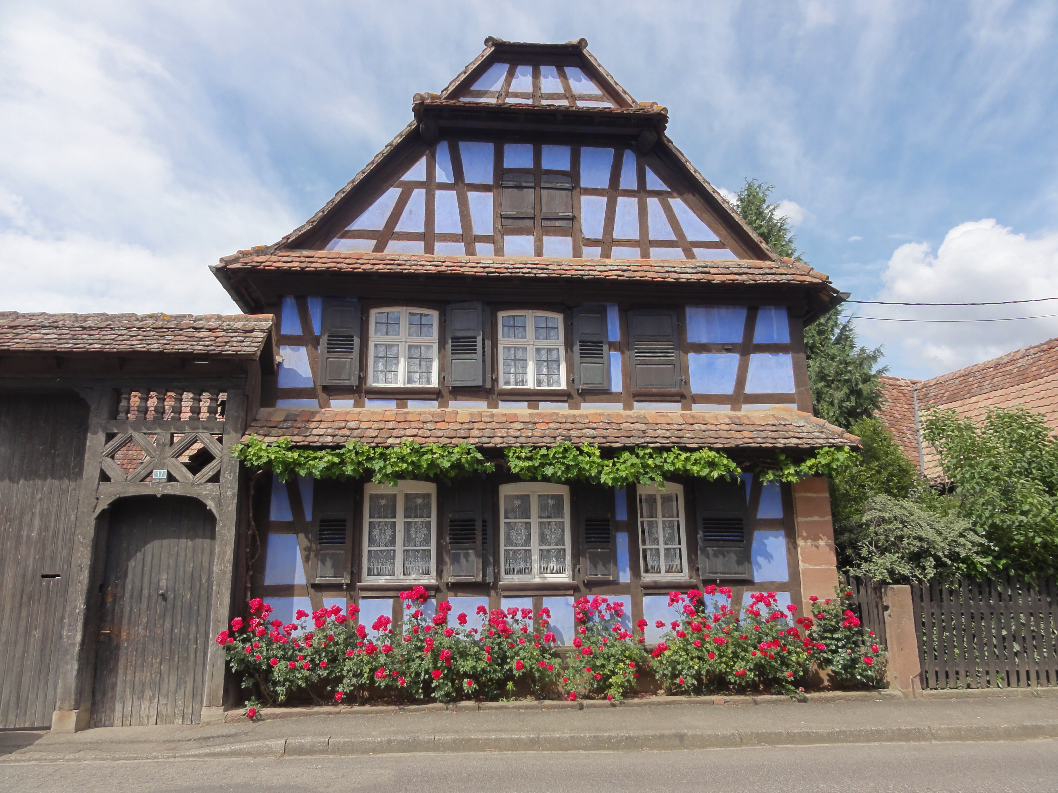 Alsace, Bas-Rhin, Wilshausen, Maison, Ancienne ferme (1836), 17 rue Principale. .